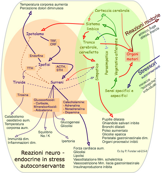 Grafica: Medicina: Stress: Reazioni neuro - endocrine e motorie allo stress autoconservante: neurologico, endocrino, neurovegetativo, sensoriale, corteccia cerebrale, cervelletto, sistema limbico, simpatico, parasimpatico, ippotalamo, ipofisi, surreni, tiroide, stressori, reazione, sistema locomotore